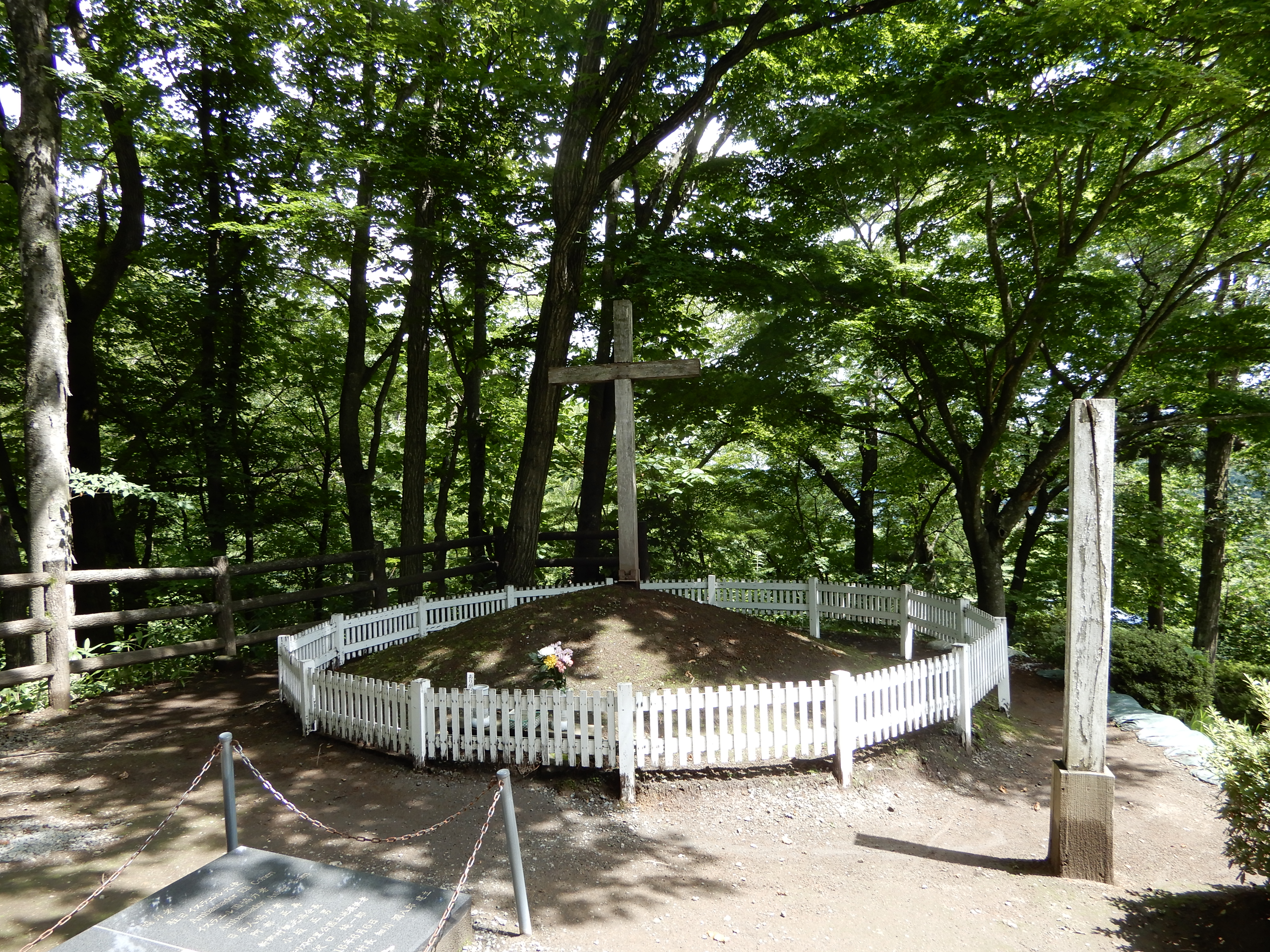 キリストの里公園(青森県三戸郡新郷村大字戸来字野月33-1)にあるキリストの墓